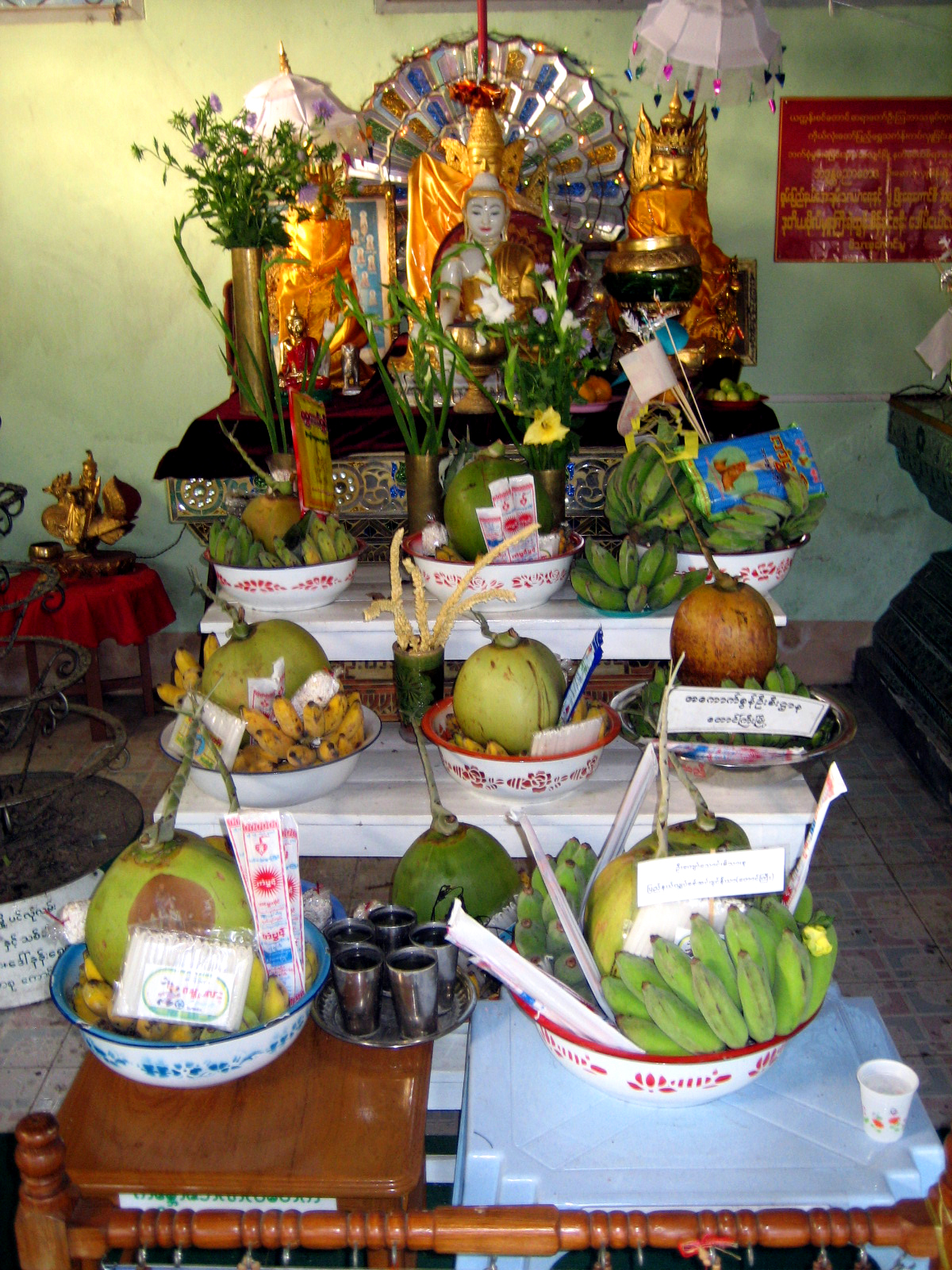 Buddhist altar at a monastery in Taunggyi, Shan State, Myanmar.